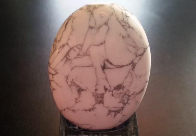 Howlith als Schmuckstein, 96ct, Cabochonschliff, oval.